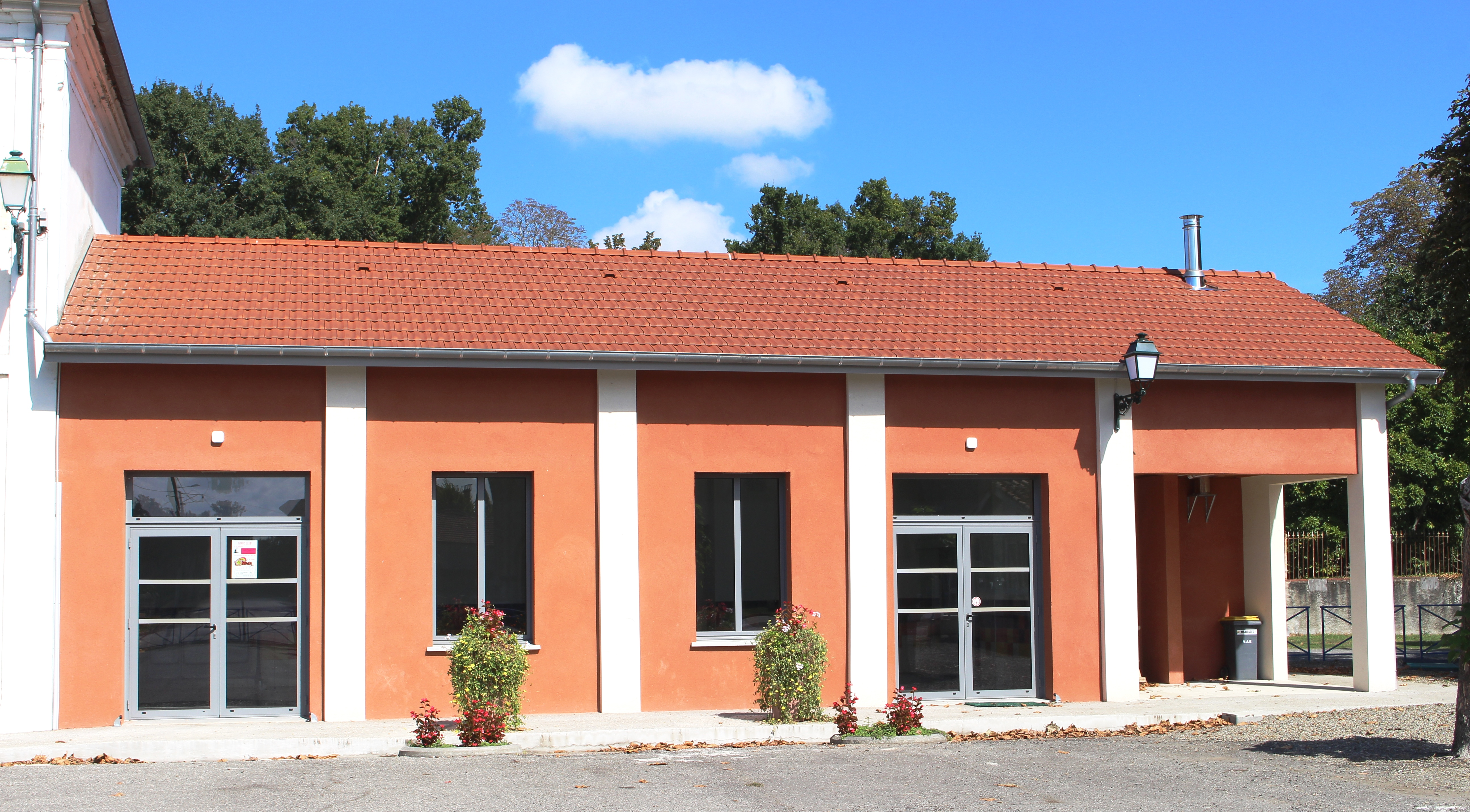 Salle des fêtes de Liac (Hautes-Pyrénées)